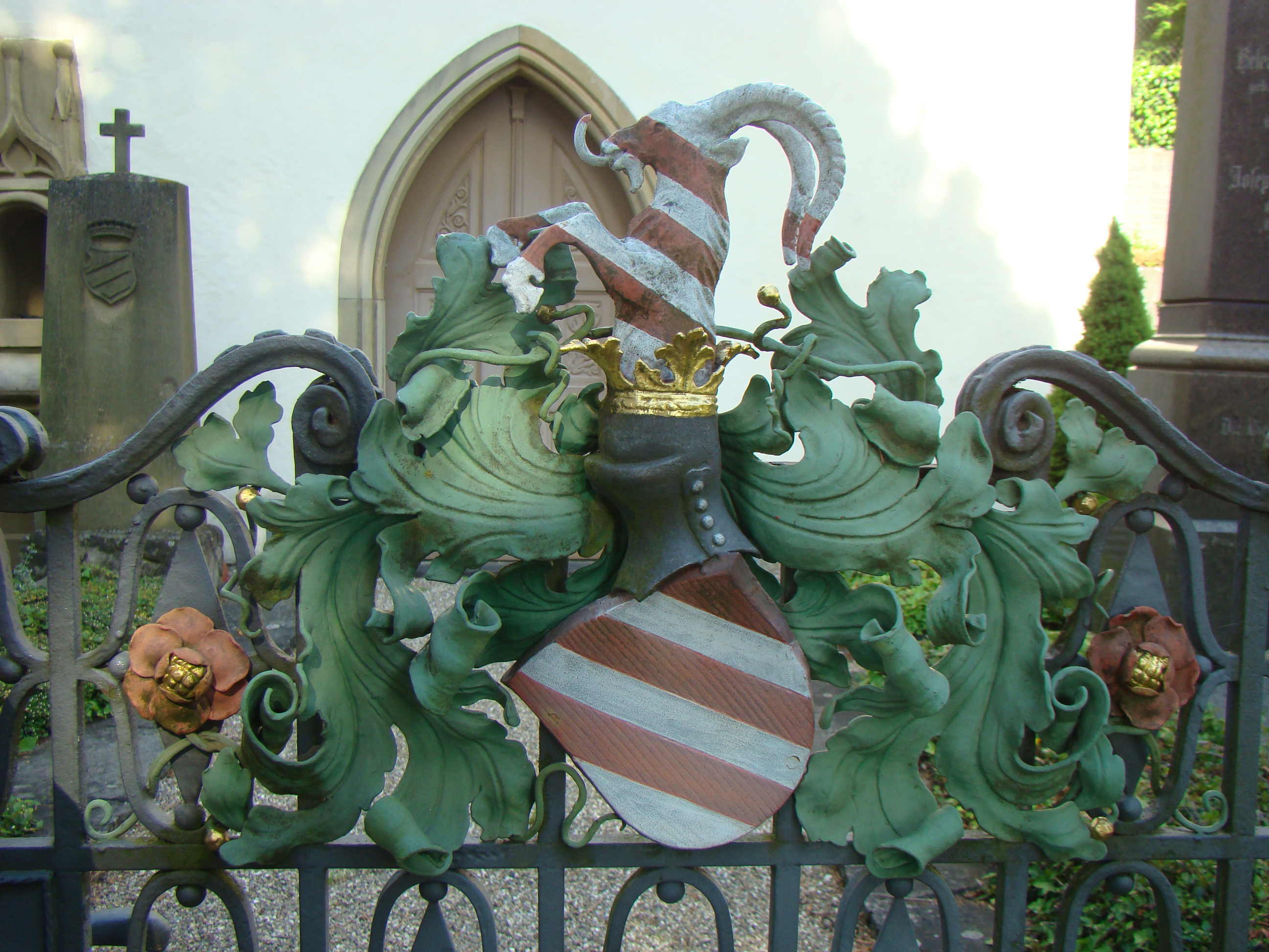 Wappen der Freiherren von Ellrichshausen am Tor zur Freiherrengrablege auf dem Friedhof in Züttlingen